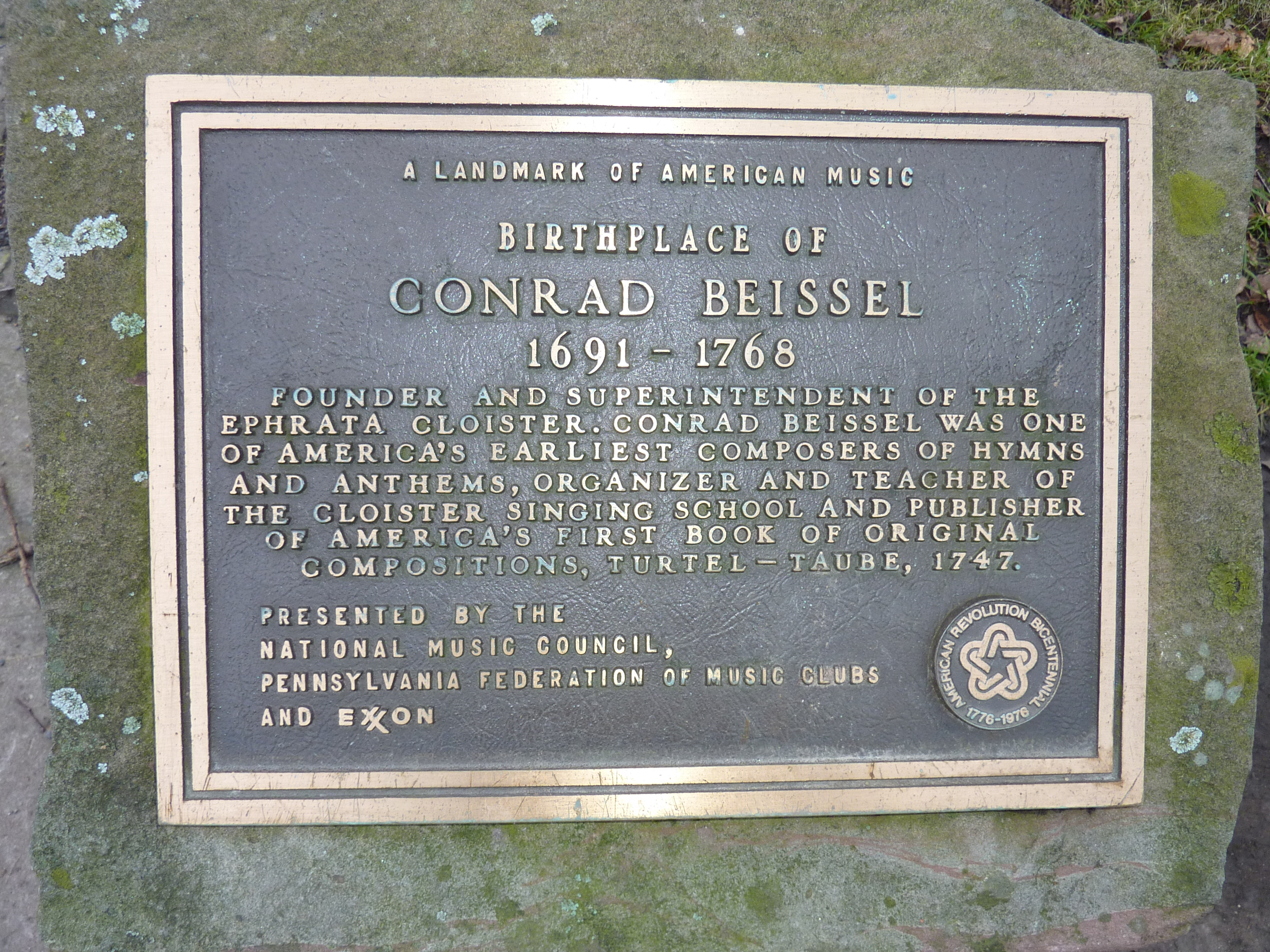 Gedenktafel in Eberbach, dem Geburtsort Beissels